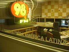 A primeira FM estéreo da América Latina. Estúdio 98 FM.